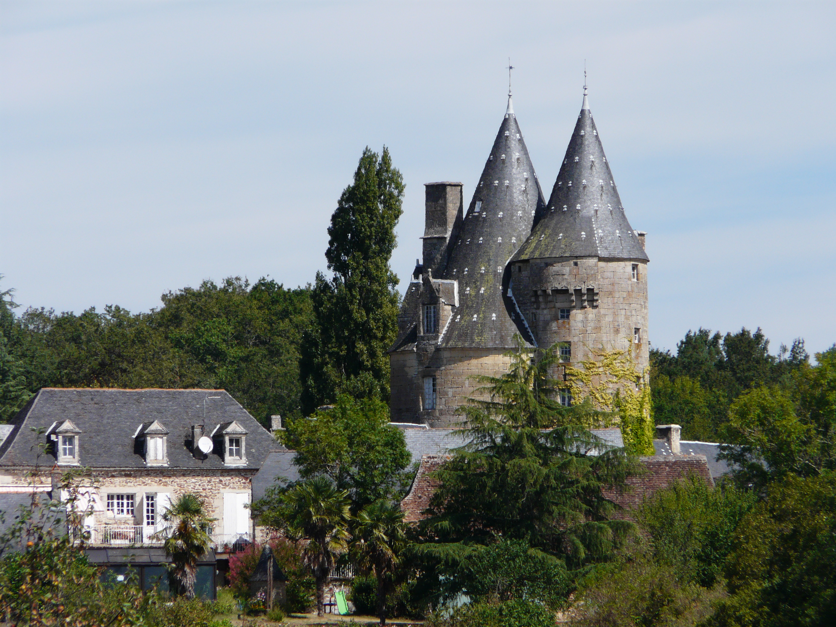 Le château de la Chapoulie, Peyrignac, Dordogne, France.